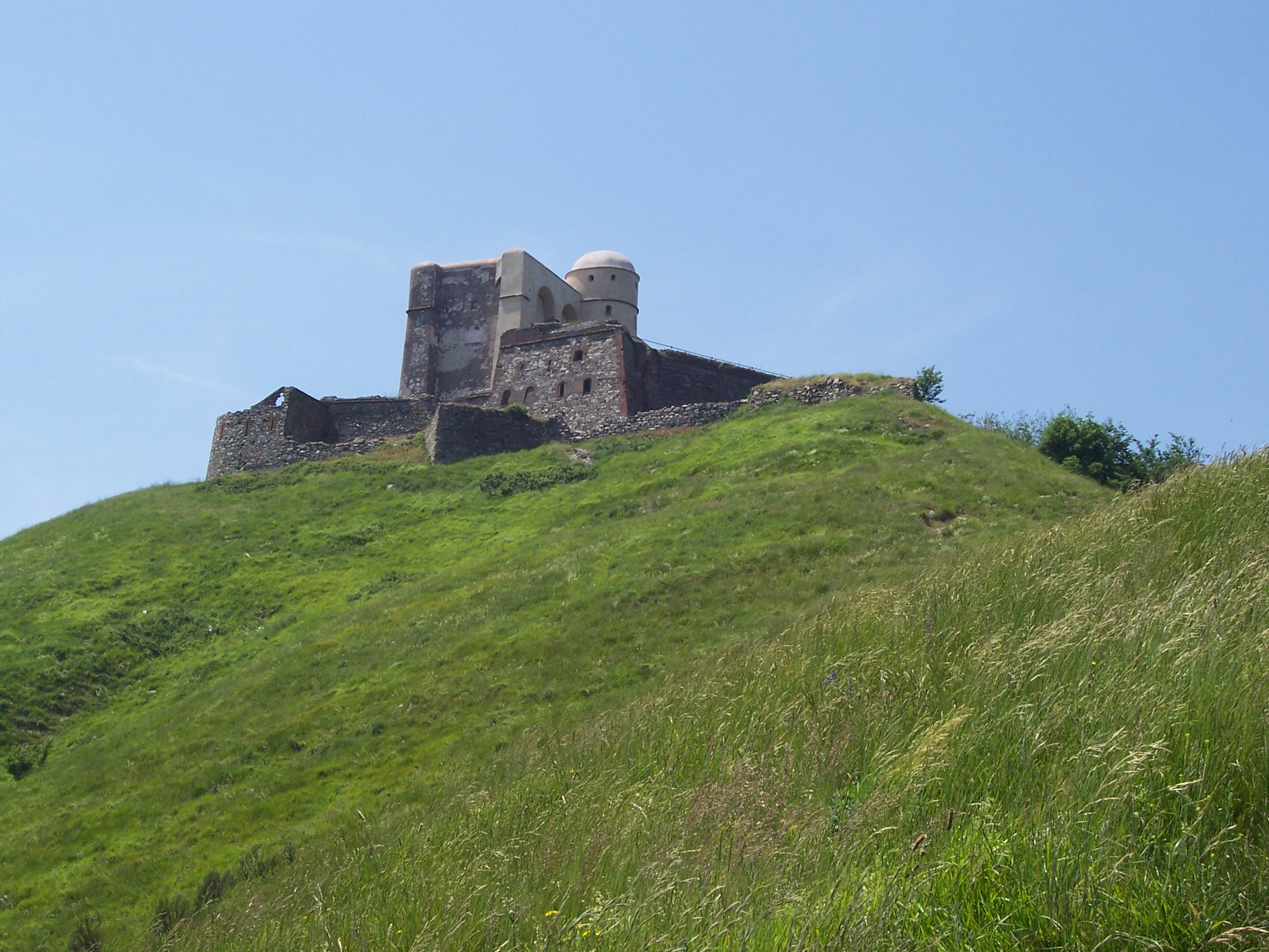 Genova - Forti di Genova, Forte Diamante Fotografia di Daniele Campi Martucci